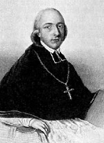 Augustin Zippe (1747 - 1816), Římskokatolický kněz a teolog.